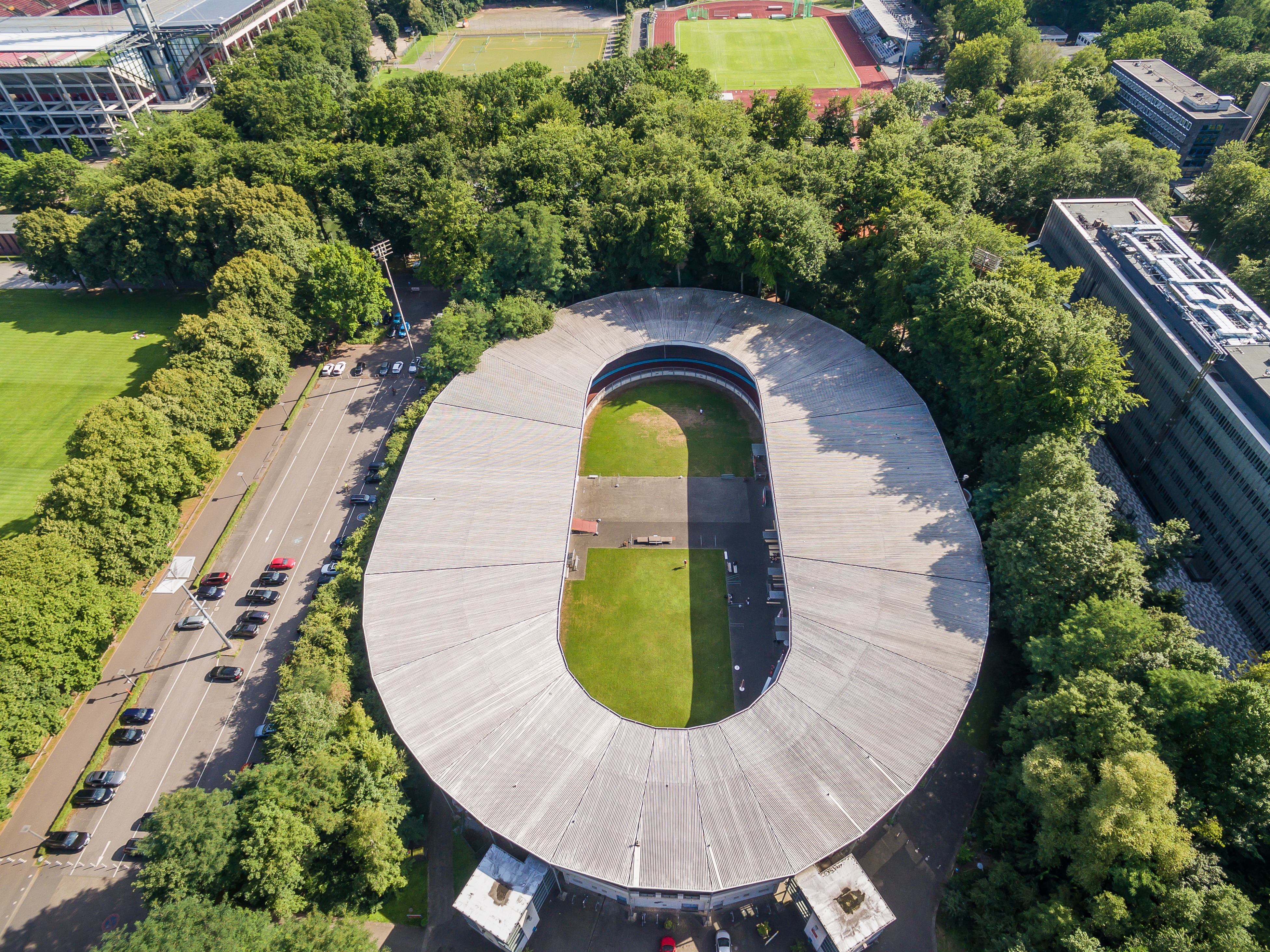 Radstadion Köln im Sportpark Müngersdorf